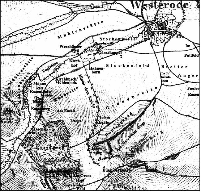 Flurnamen in der ehemaligen Gemarkung der südniedersächsischen Wüstung Rosenthal